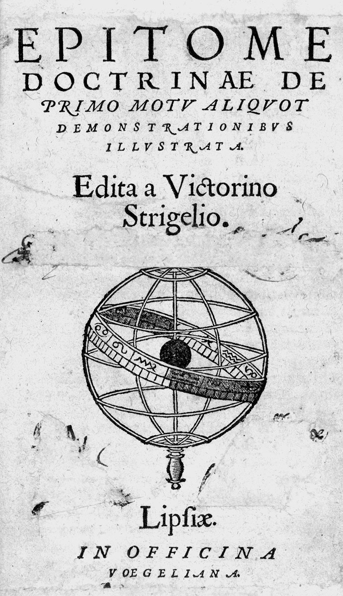 Victorinus Strigel: Epitome doctrinae de primo motv aliqvot demonstrationibvs illvstrata, Leipzig, in officina Voegeliana (1564)